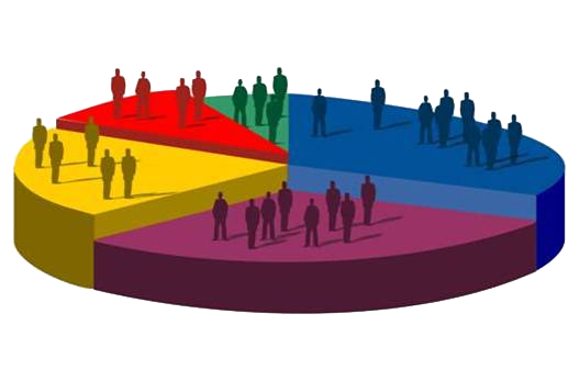 Gráfico circular, conocido también como gráfico de pastel.